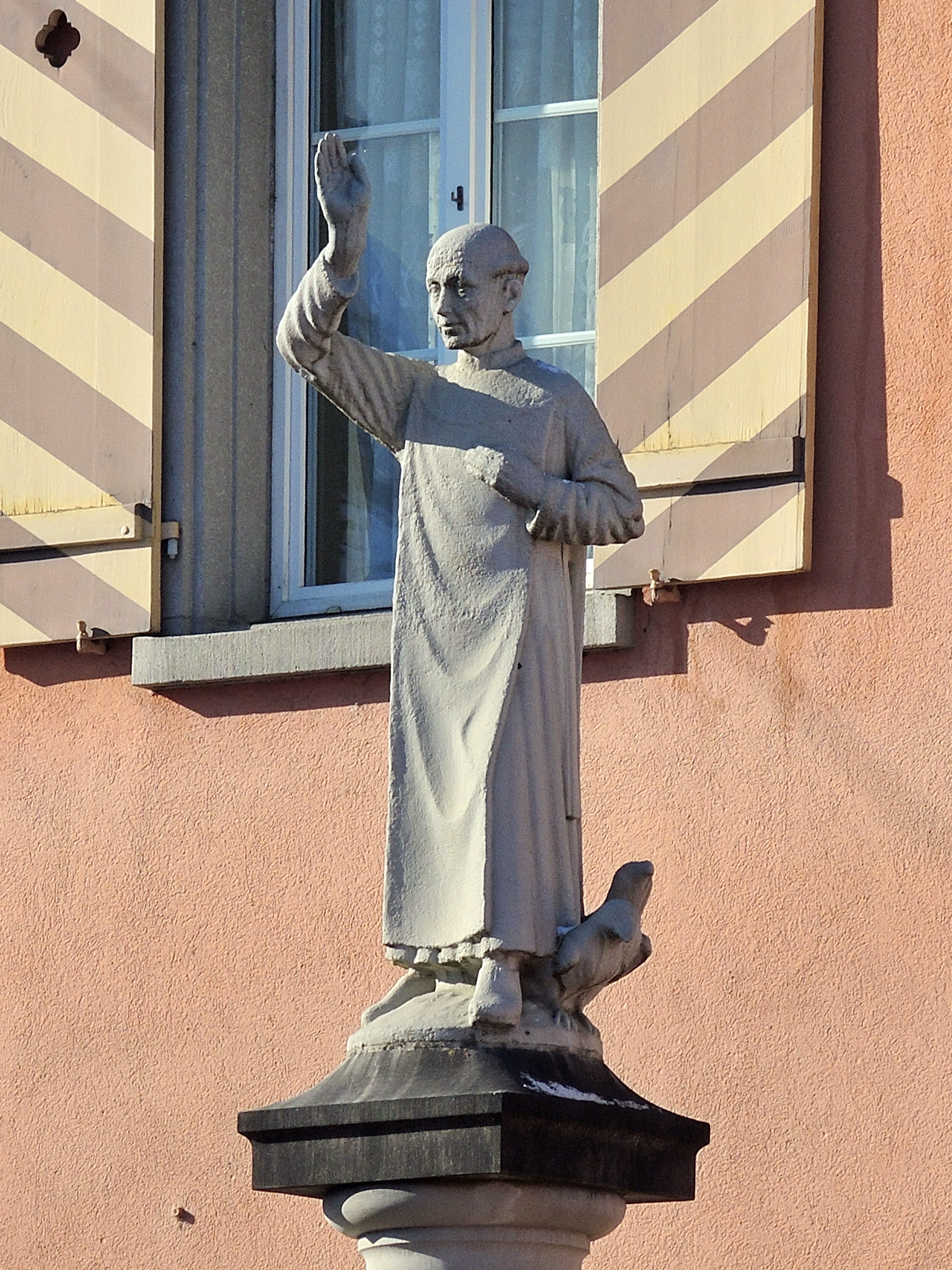 Einsiedeln (Switzerland)